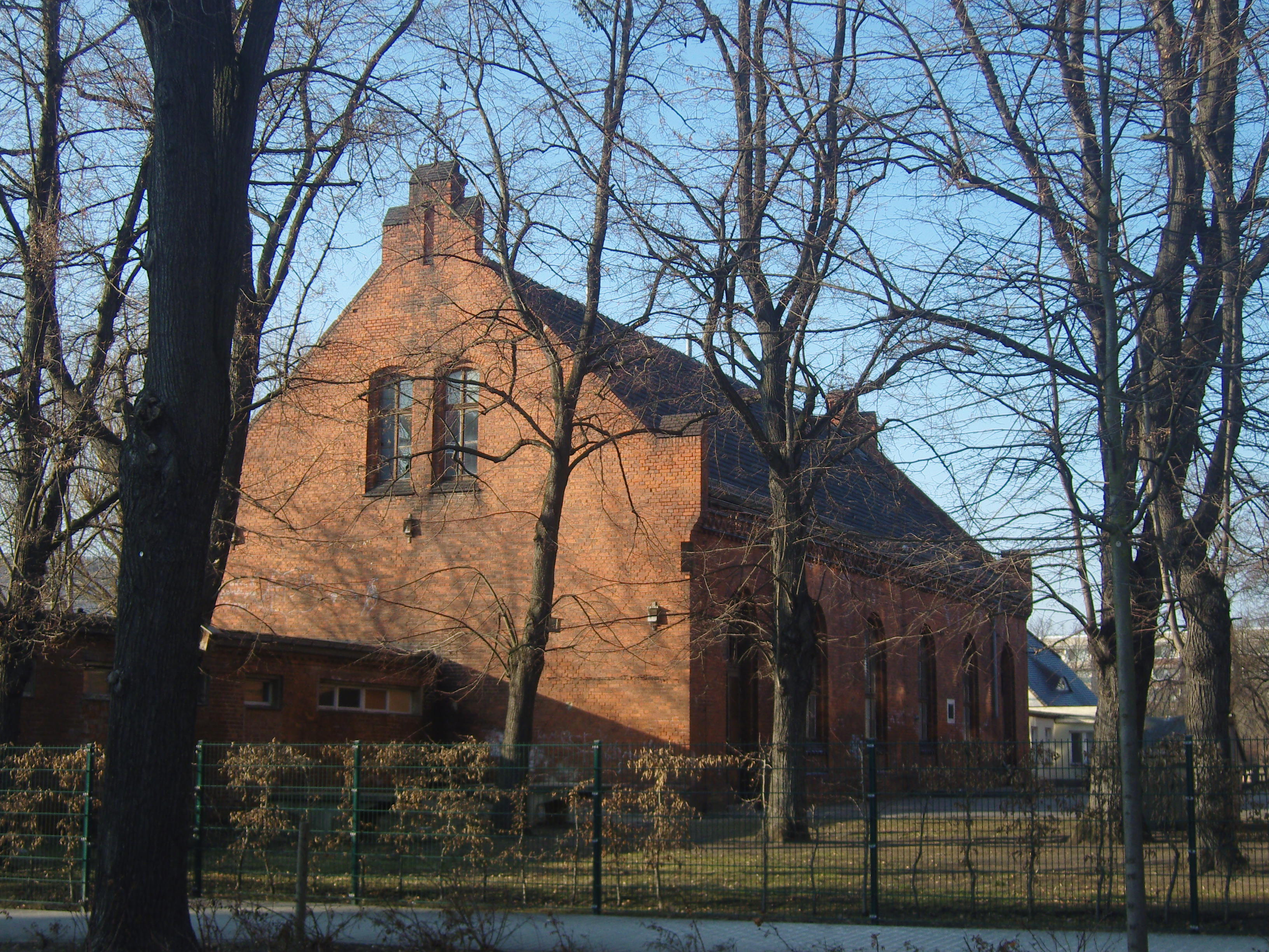 denkmalgeschützte Schule mit Turnhalle in Senftenberg, ehemalige POS I Arthur Wölk, ehemaligen Realschule